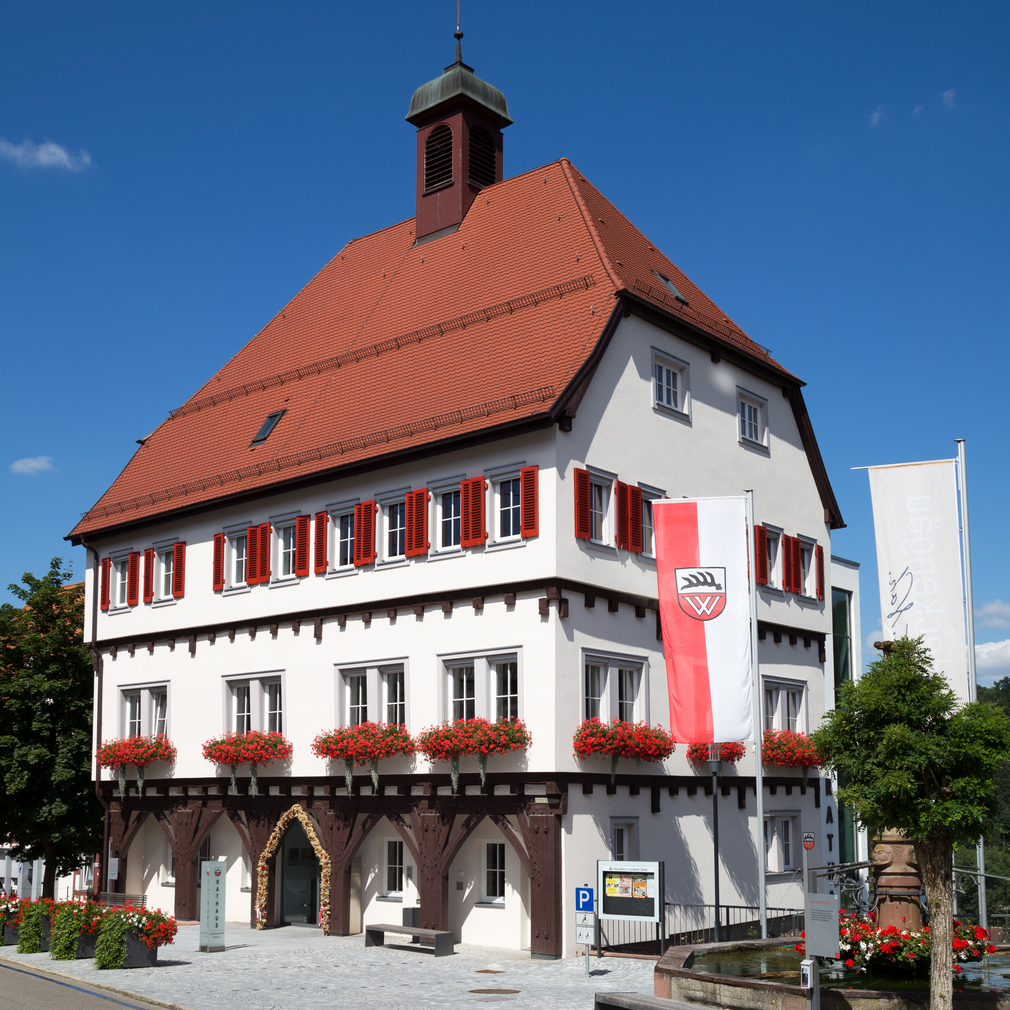 Rathaus in Wildberg im Schwarzwald